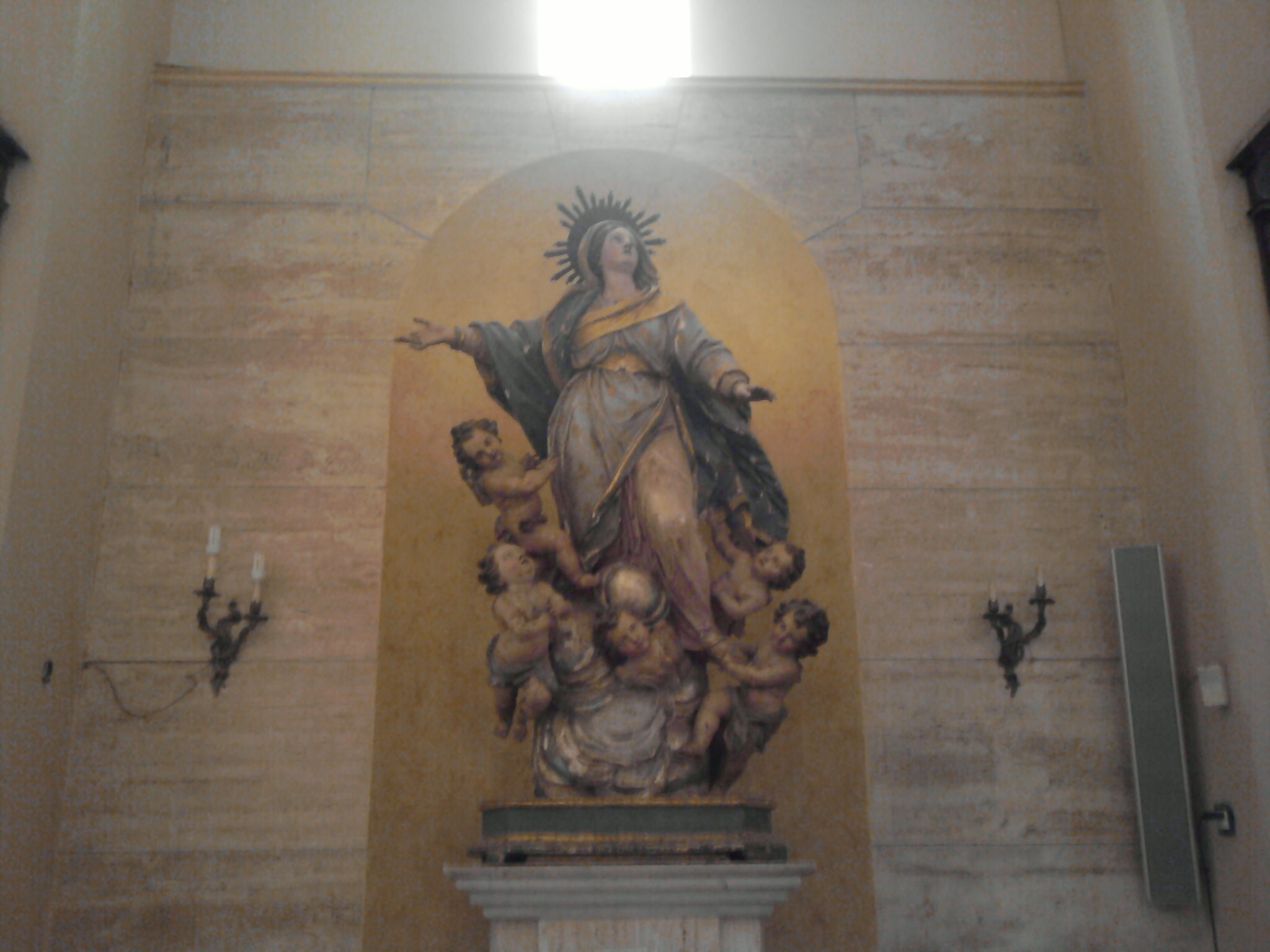 Statua di Maria Santissima Assunta custodita nella Concattedrale di San Nicola di Palmi